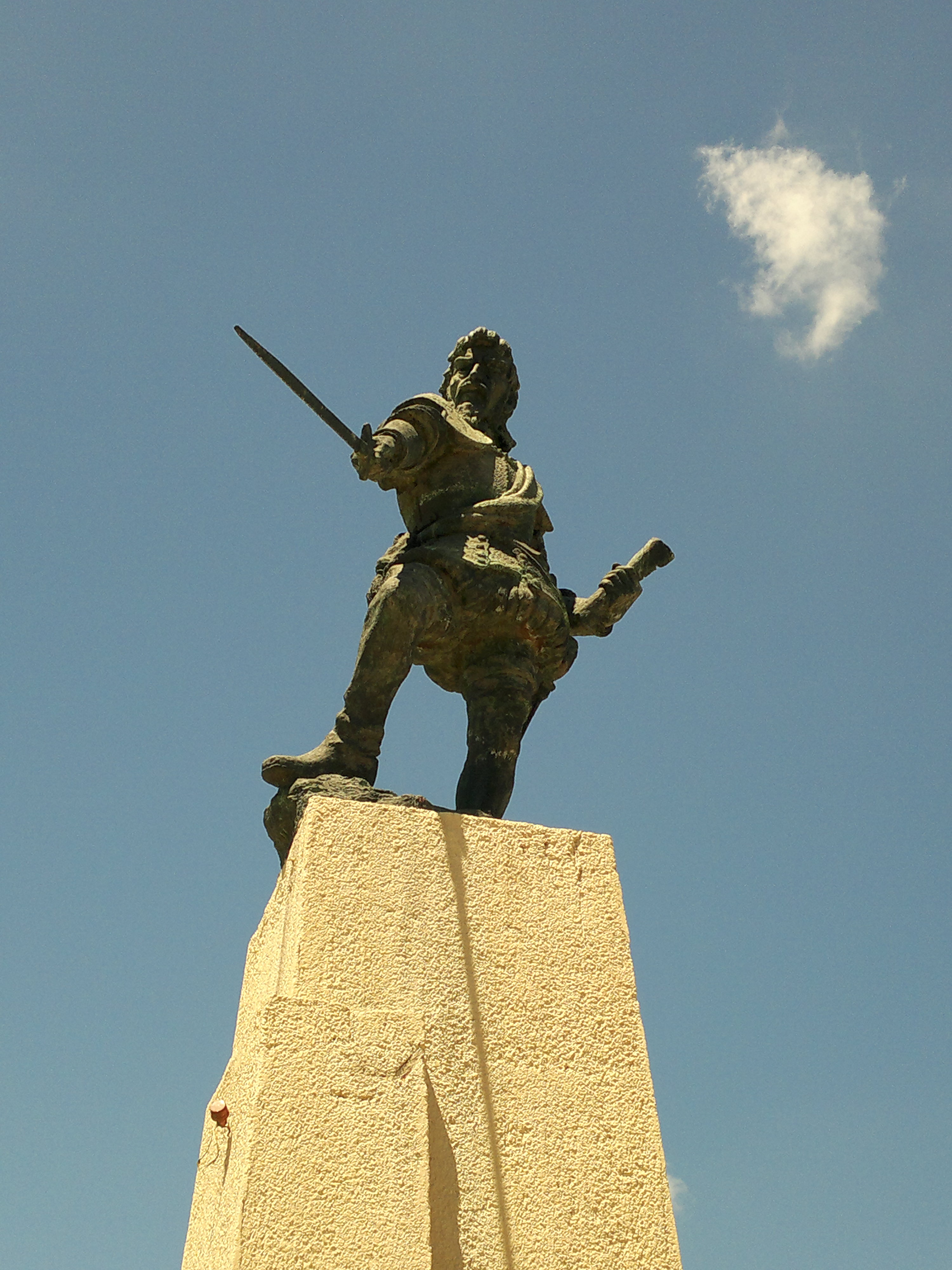 Estatua del conquistador español Francisco de Aguirre, obra del escultor Roberto Delgado ubicada en la ciudad de Santiago del Estero, Argentina.